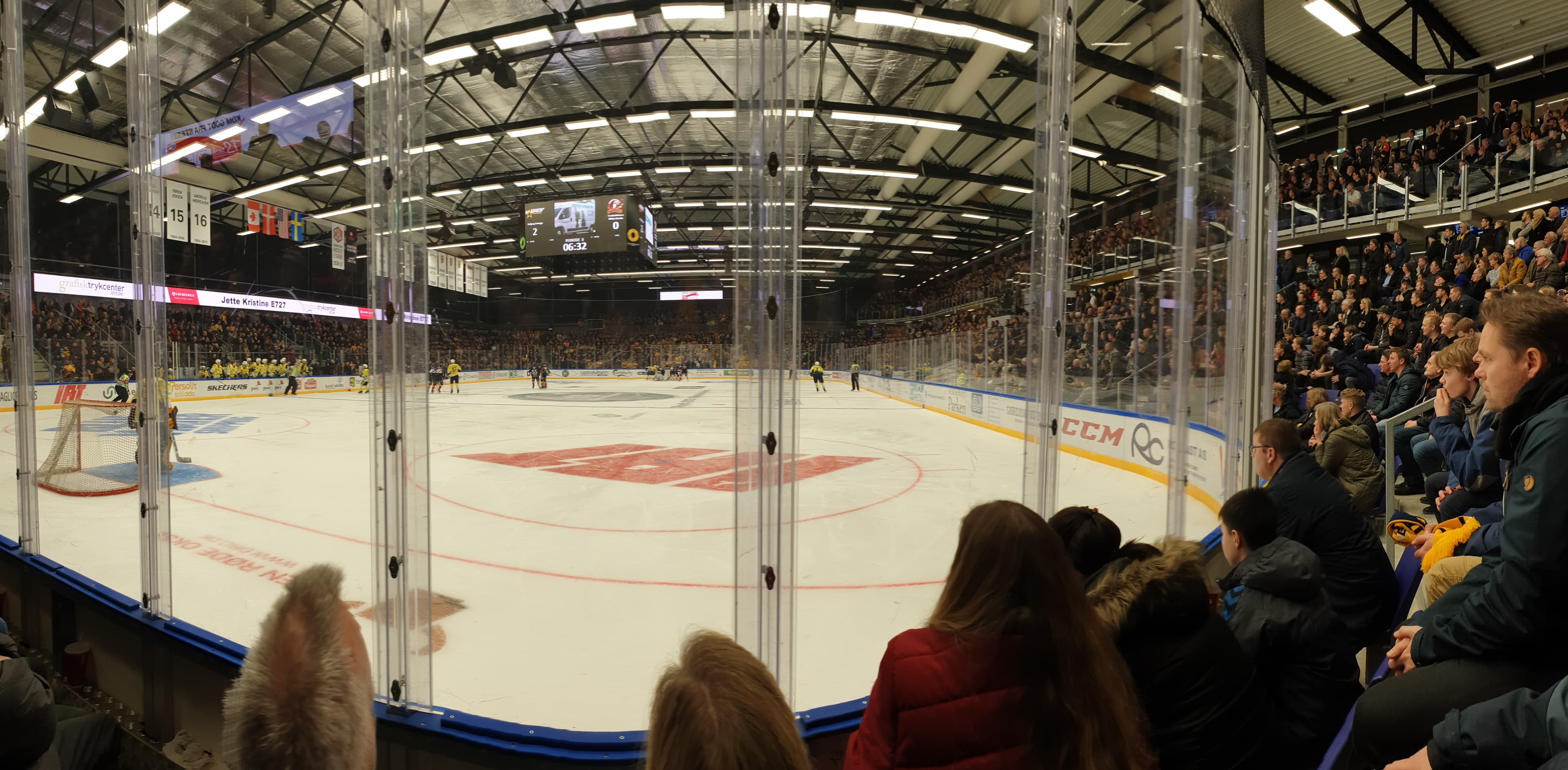 (Granly Hockey Arena efter renoveringen i 2019. Her spiller Esbjerg Energy mod Frederikshavn White Hawks)